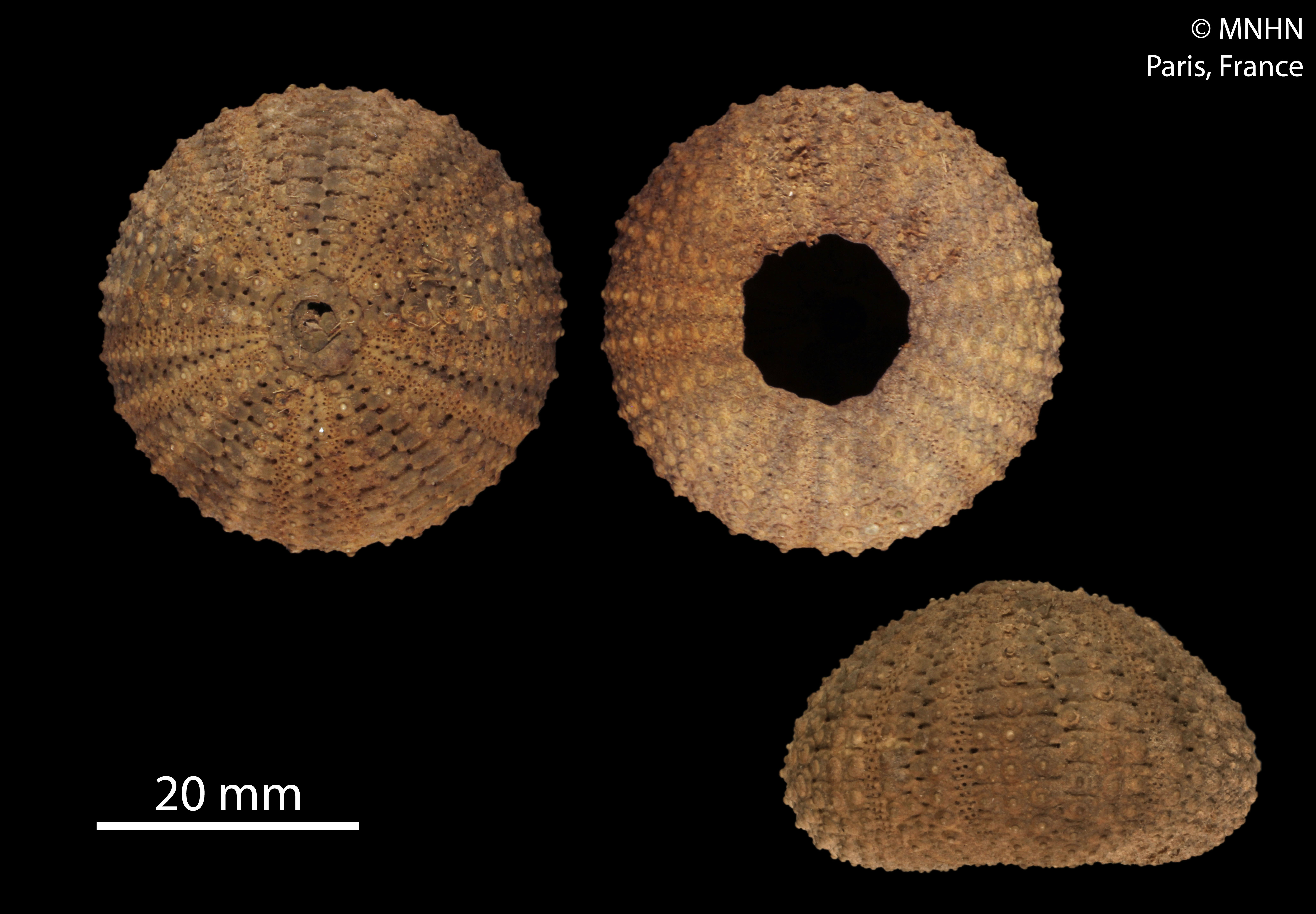 Temnopleurus toreumaticus, collection du Muséum National d'Histoire Naturelle (Paris, France).